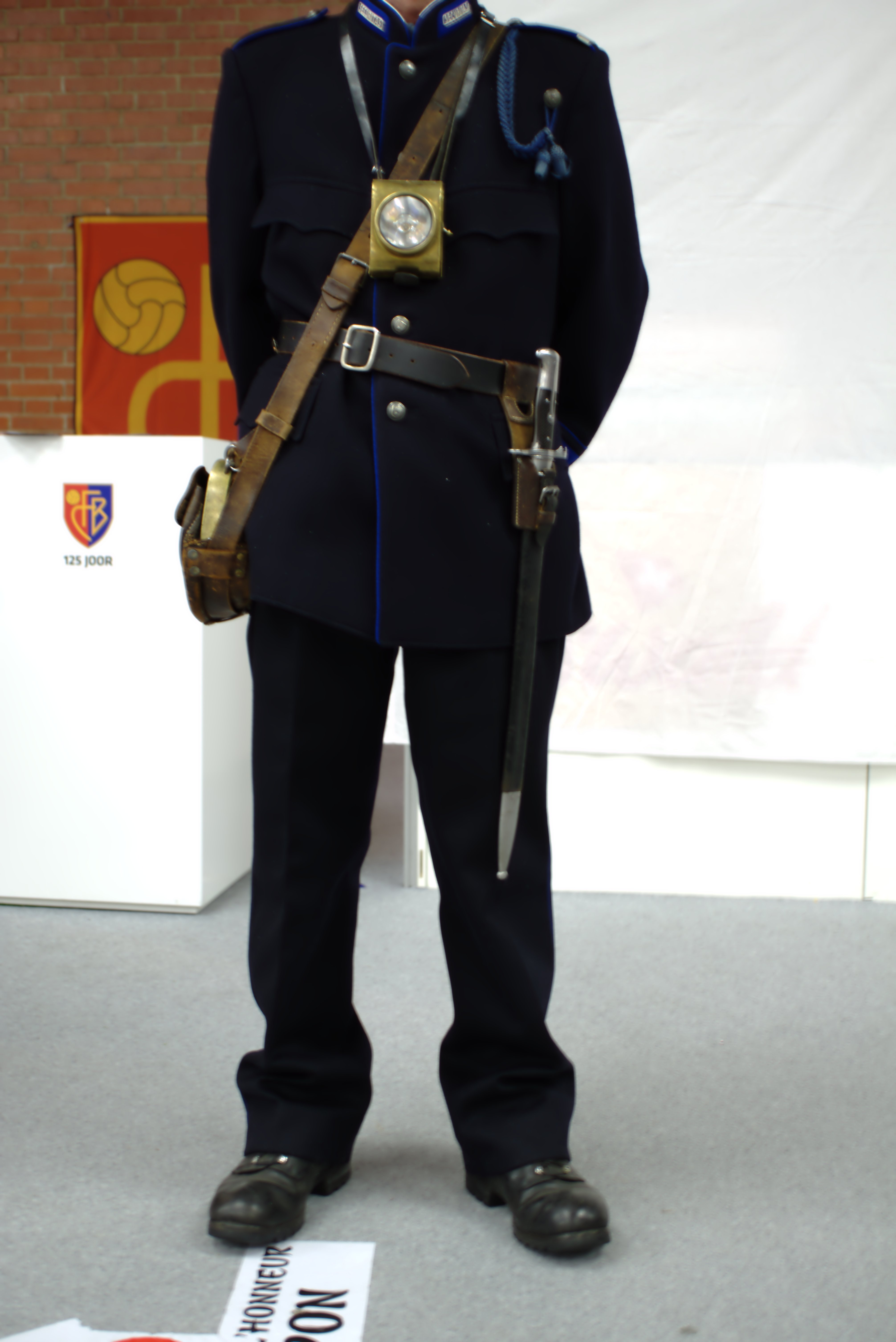 Ein Wachmann der Securitas in historischer Uniform, fotografiert an der Mustermesse in Basel.